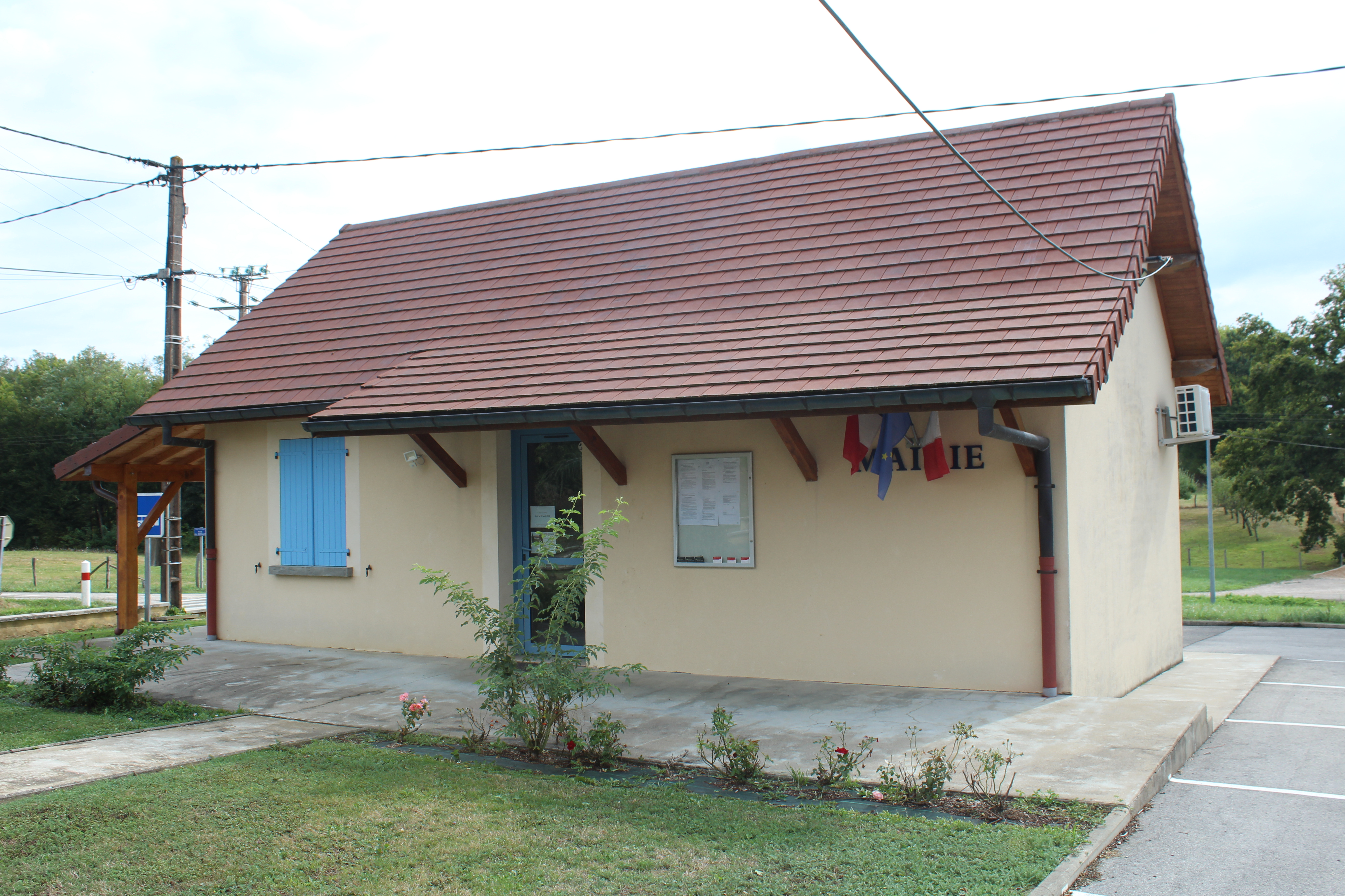 Mairie de Bois-de-Gand.